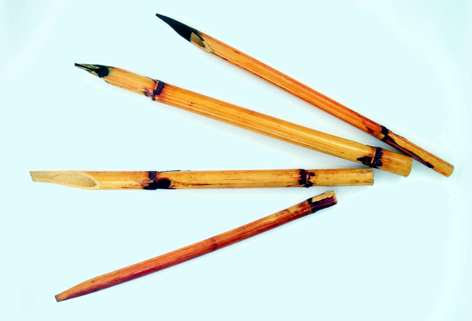 Some of my qalams